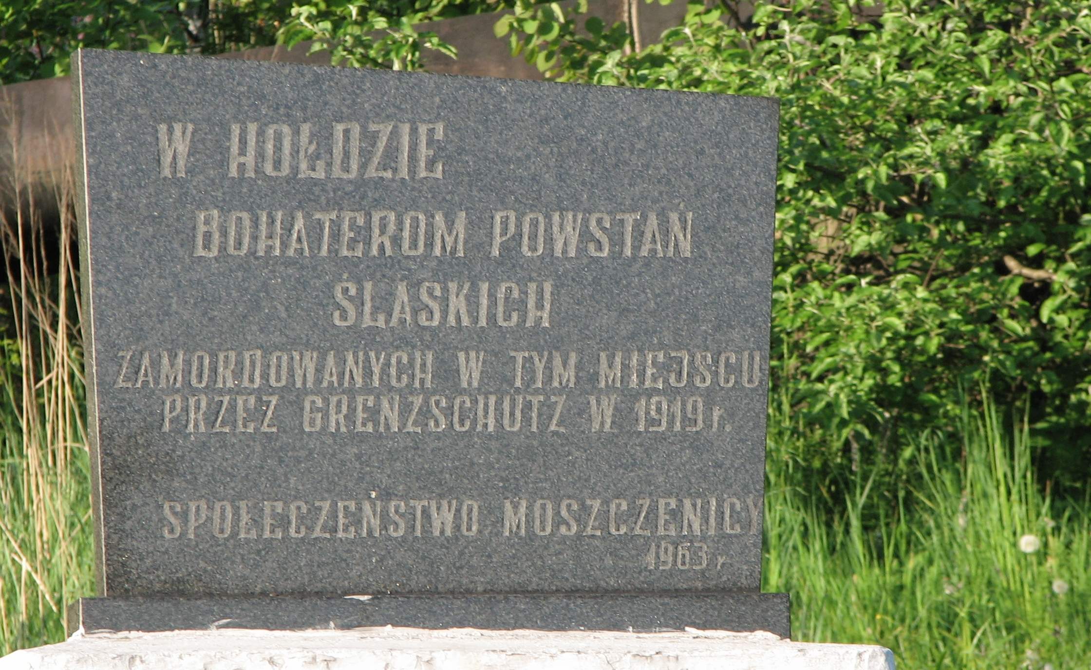 Pomnik zamordowanych przez Grenzschutz - Jastrzębie Zdrój - Moszczenica